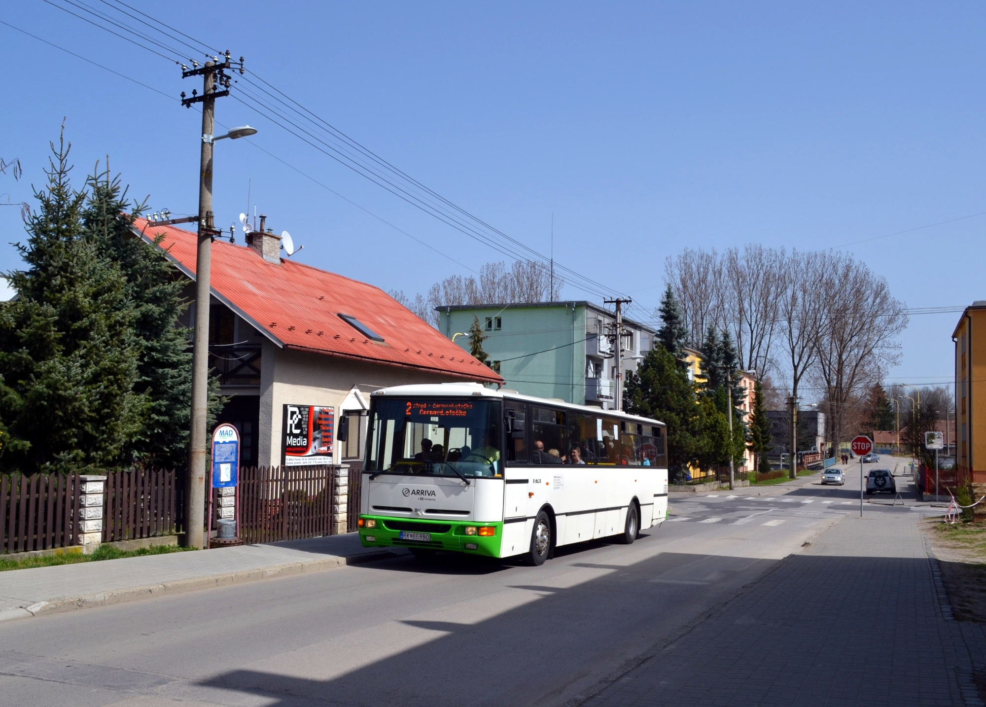 Linka č. 2 na ulici Do Baničného